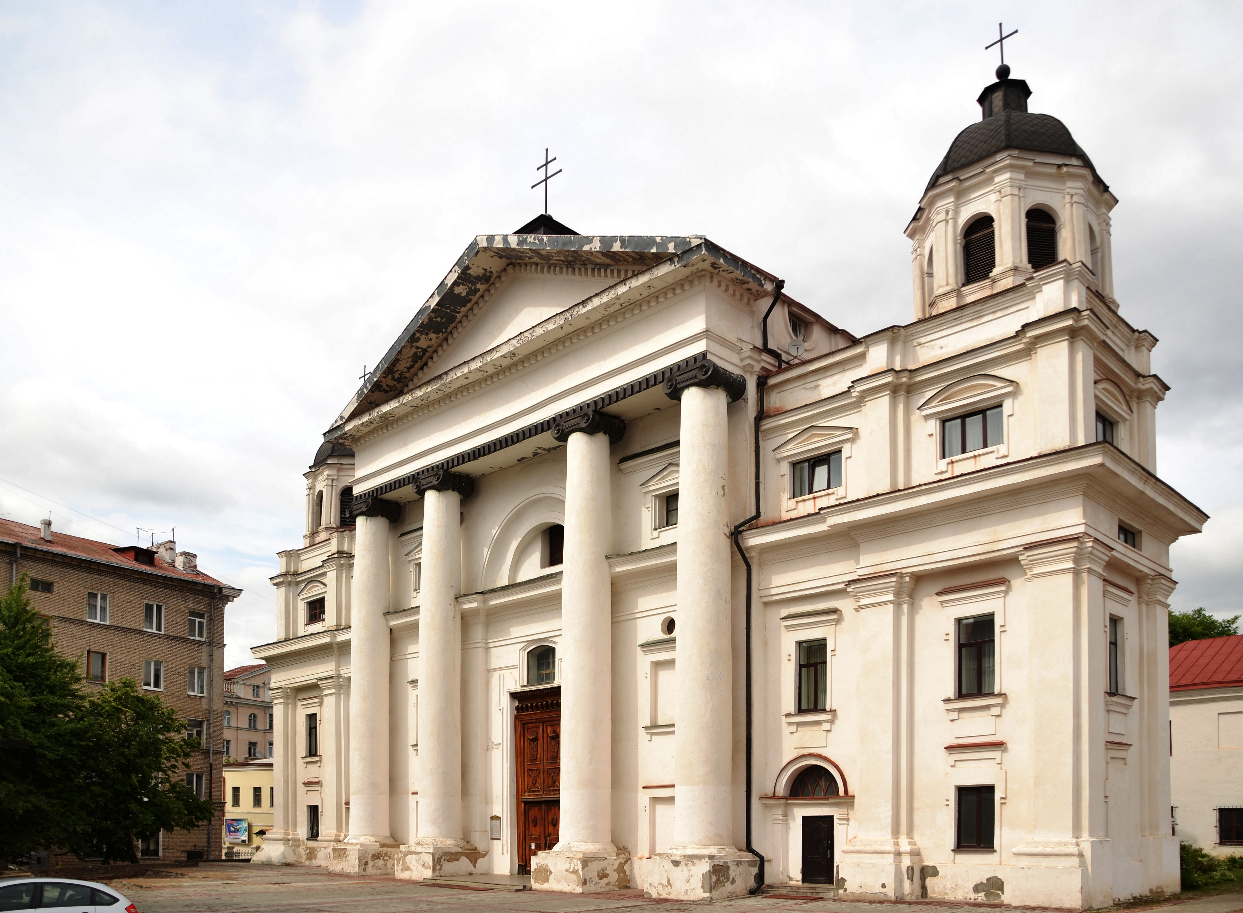 Беларуская (тарашкевіца): Комплекс былога кармеліцкага кляштара:касьцёл Св. Станіслава (Унебаўзяцьця Найсьвяцейшай Дзевы Марыі) з пляба- ніяй і росьпісам у інтэр’еры касьцёла;тэрыторыя комплексу:з паўднёвага боку абмежаваная існуючай падпорнай сьцяной, якая ўключае праезд ад чырвонай лініі забудовы да перадкасьцельнай плошчы, і далей на ўсход ад падпорнай сьцяны перадкасьцельнай плошчы ўмоўнай лініяй, паралельнай вул. Камса- мольскай (55 м на поўнач ад чырвонай лініі забудовы вул. Камсамольскай);з усходняга боку абмежаваная ўмоўнай лініяй, паралельнайвул. Ленінскай (50,5 м на захад ад чырвонай лініі забудовы, арыентаванай па дамах № 16, 20 па вул. Ленінскай);з паўночнага боку абмежаваная ўмоўнай лініяй, паралельнай падпорнай сьцяне (46,2 м на поўдзень ад чырвонай лініі забудовы(ад дома К. Лібкнехта, 7);з заходняга боку абмежаваная ўмоўнай лініяй у створы існуючай падпорнай сьцяны. г. Магілёў This is a photo of Belarusian heritage monument. Reference number: 512Г000020 ( WLM)